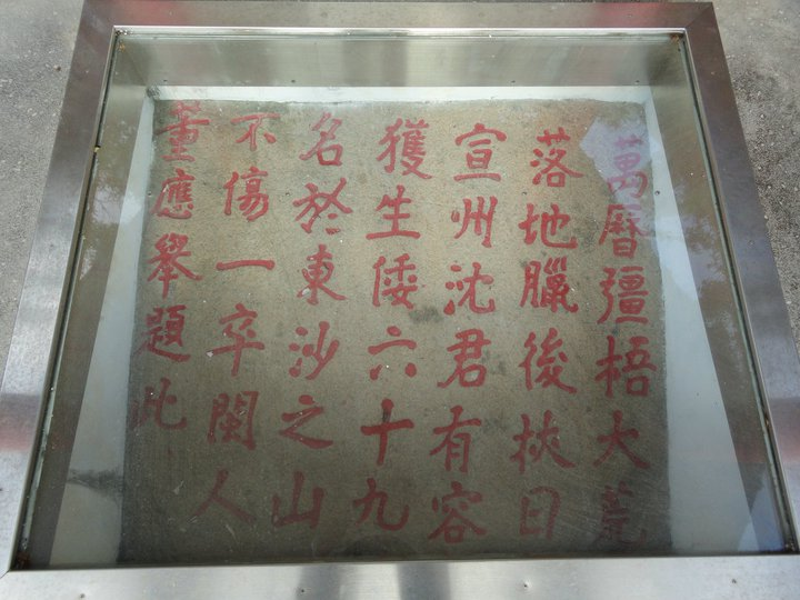 大埔石刻刻文上記載中國明代萬曆年間，沈有容擊敗日本船隊的事蹟，由董應舉題文於此。內容原文為：「萬曆彊梧大荒落地臘後挾日宣州沈君有容獲生倭六十九名於東沙之山不傷一卒閩人董應舉題此」